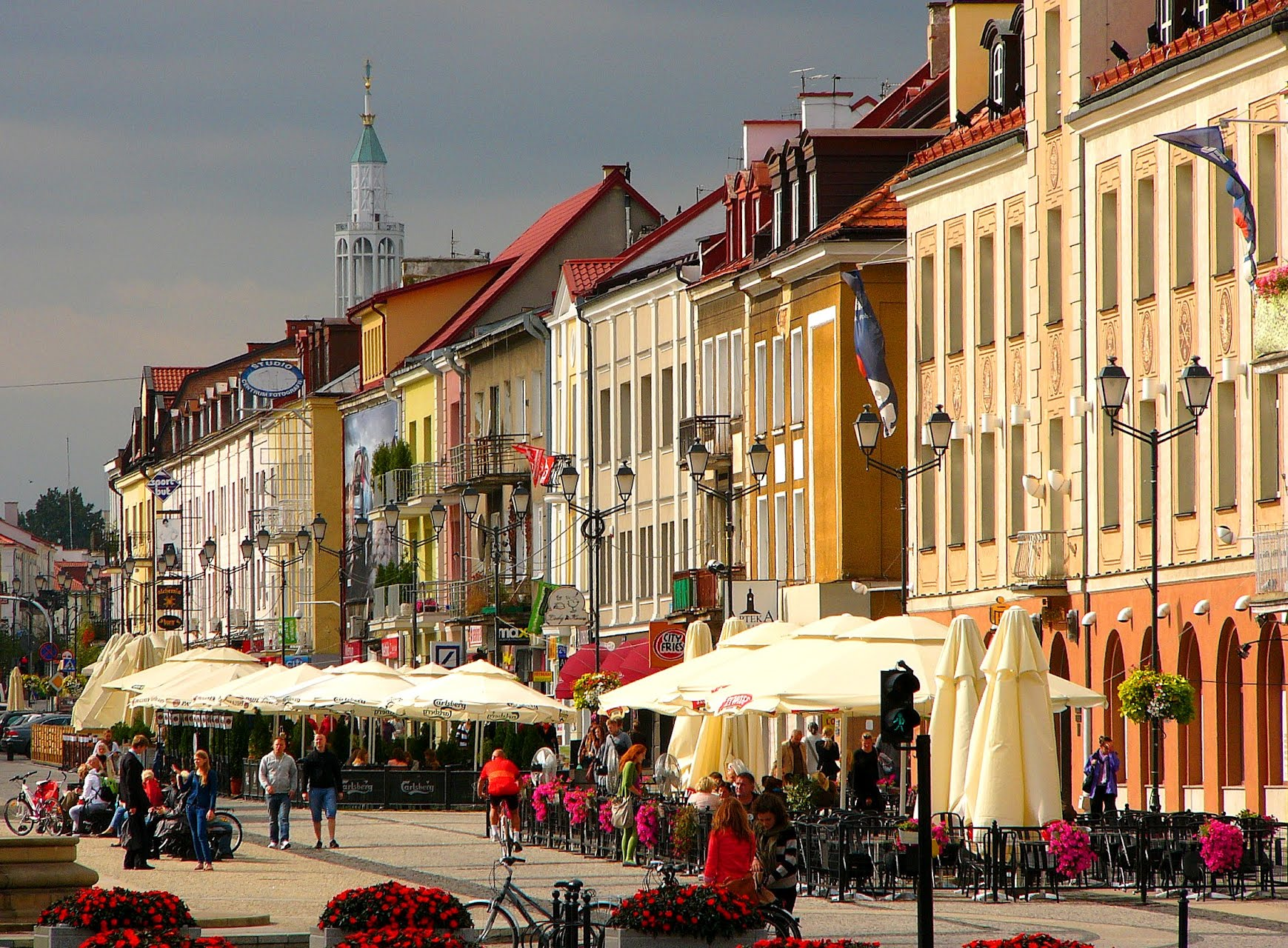 Białystok. Fasady starówki lśnią w promieniach słońca. W tle wieża kościoła św. Rocha.